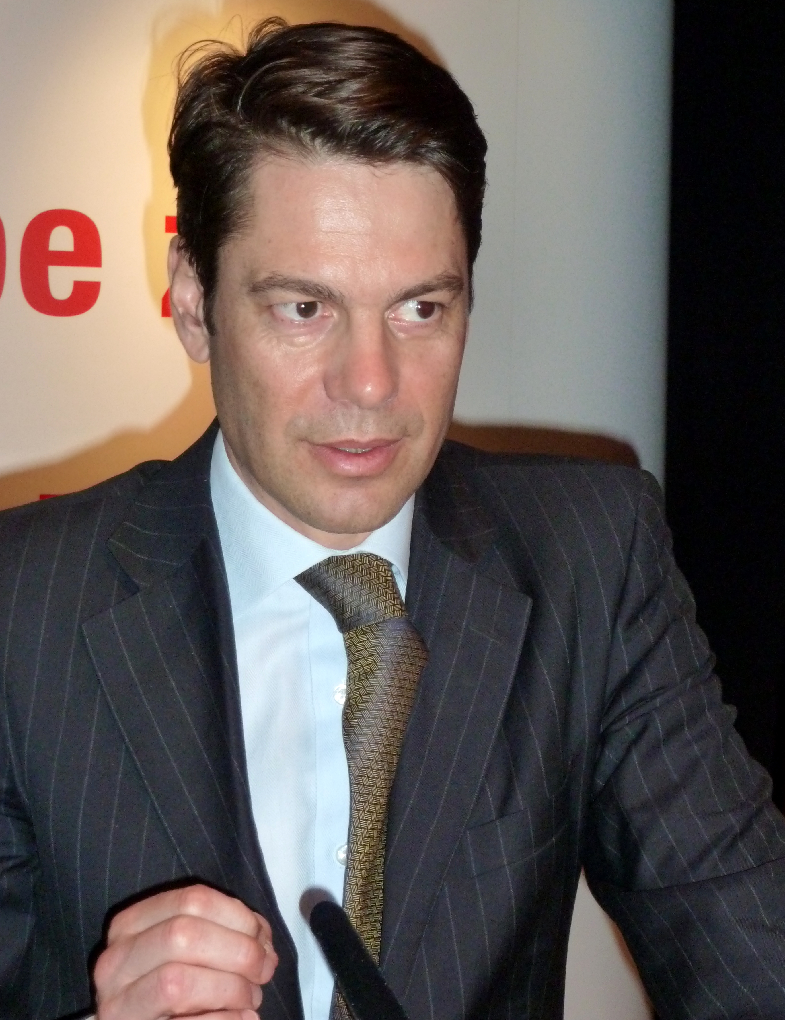 Stefan Brupbacher, Generalsekretär der FDP.Die Liberalen an einer Versammlung der FDP Schweiz in Zürich.